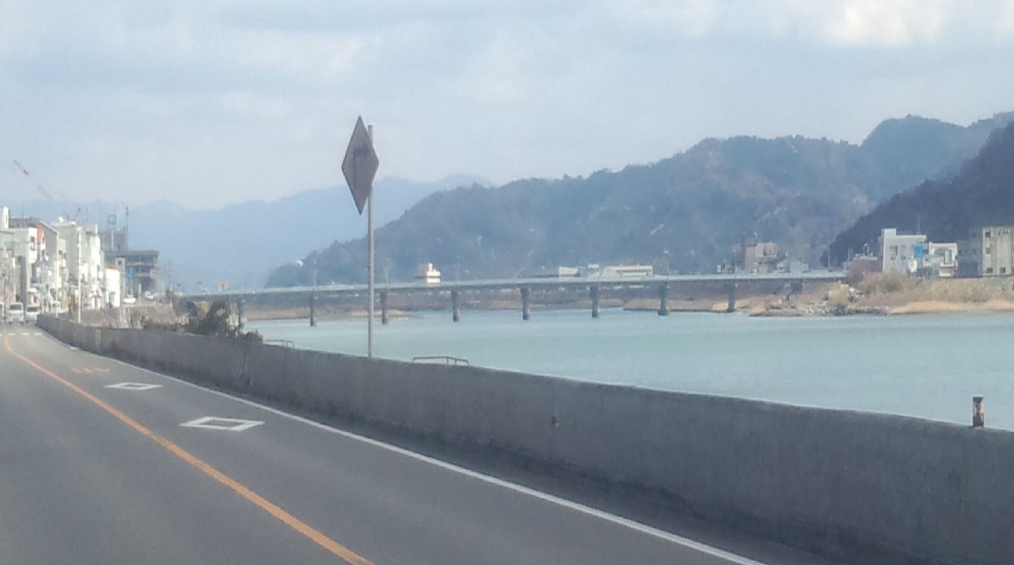 有田川（有田市内）